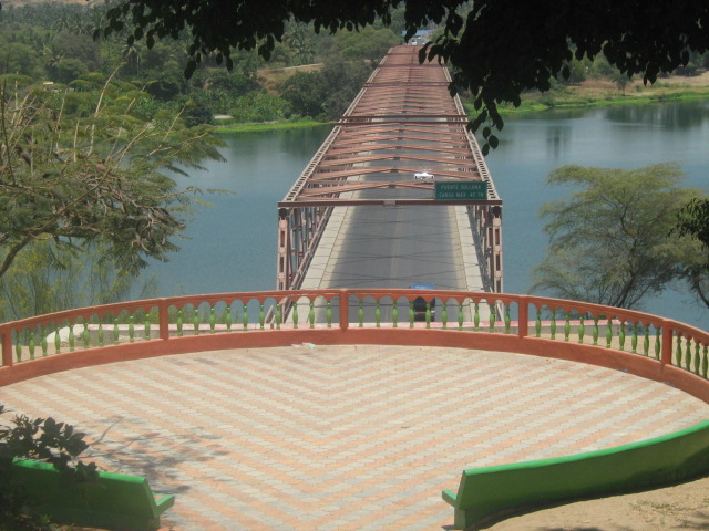 puente y mirador de sullana